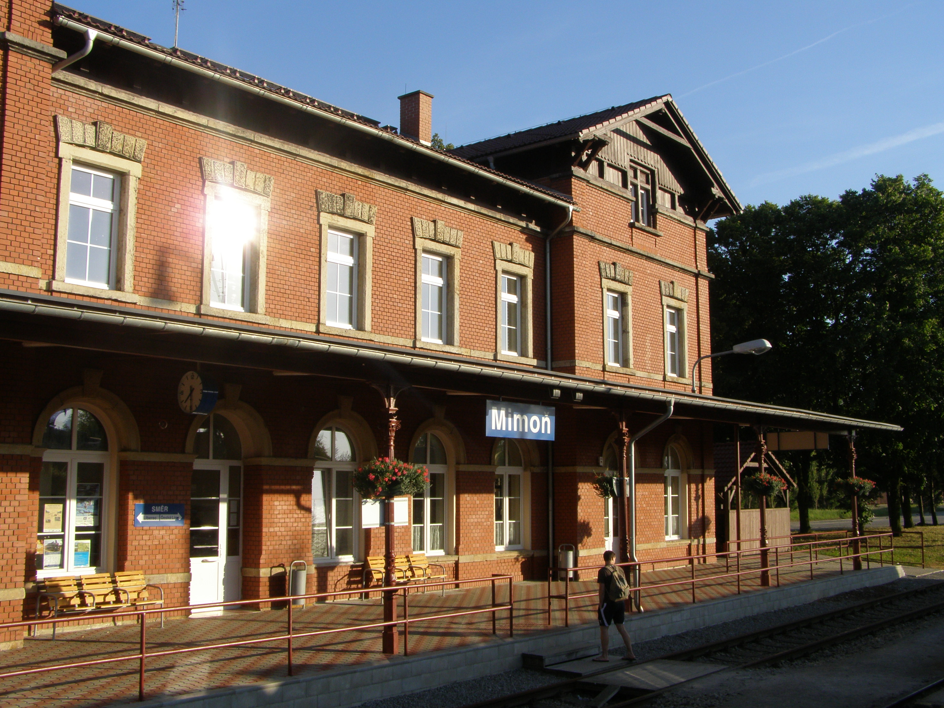 Česky: Mimoň, vlakové nádraží